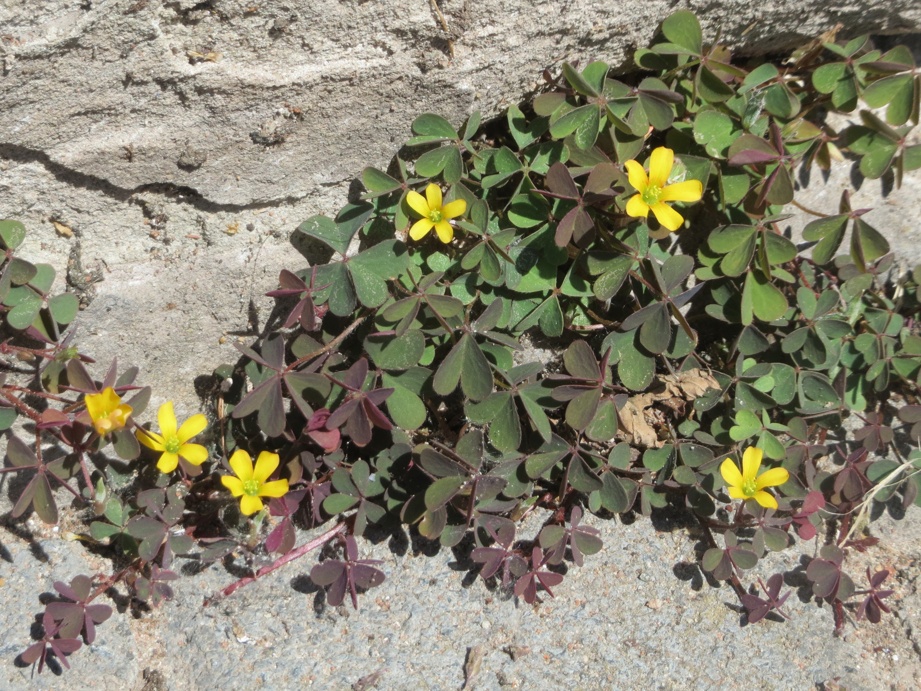 Ritzenbotanik: Horn-Sauerklee (Oxalis corniculata) in Brebach-Fechingen